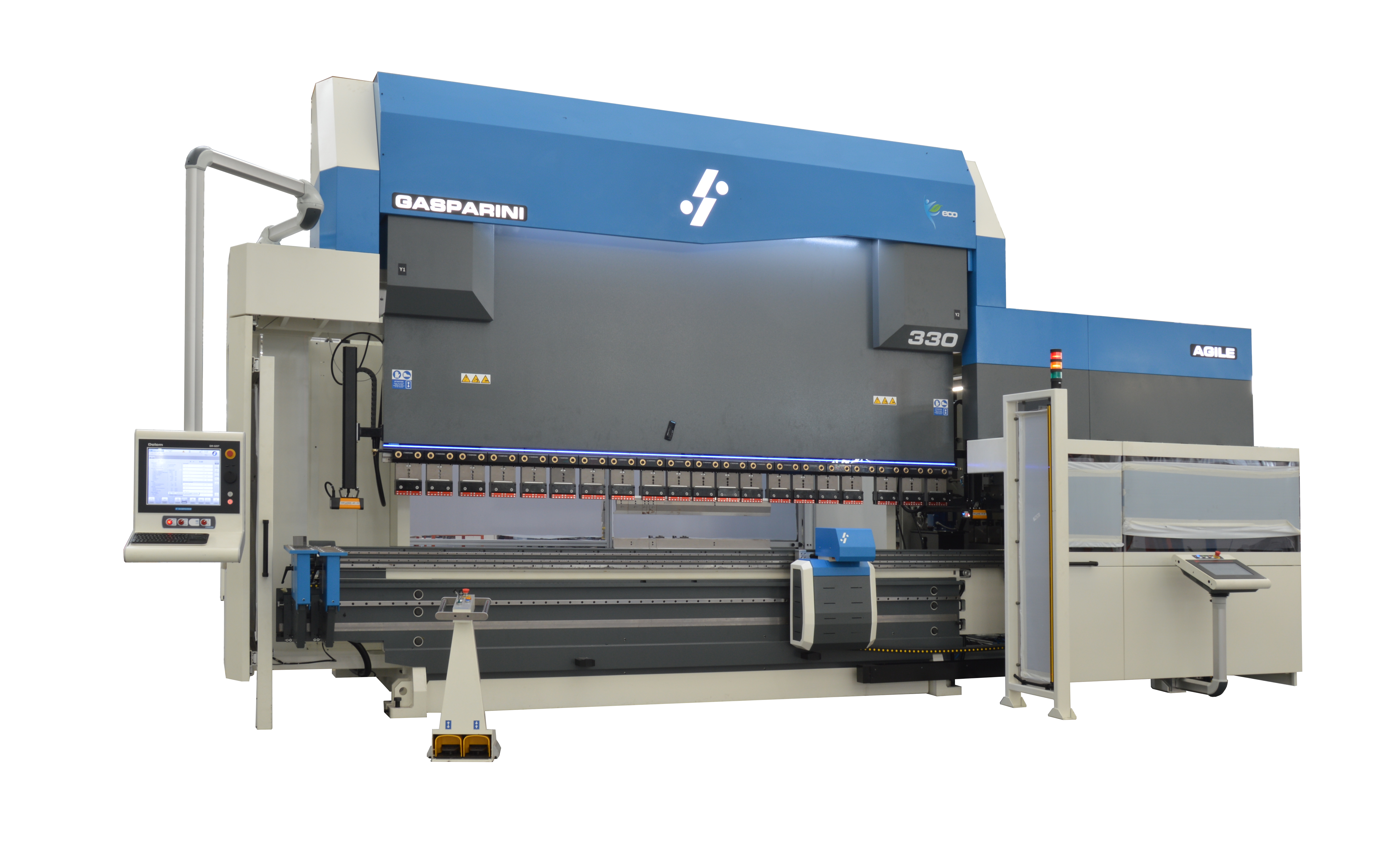 An Automatic Tool Changer for press brakes, used to set up, rearrange, and remove punches and dies. Tooling is stored in a motorized tool rack (right) and is placed in the desired position by the shuttle (blue/grey/white on center).